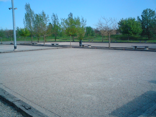 Boulodrome de ville du Passage d'Agen